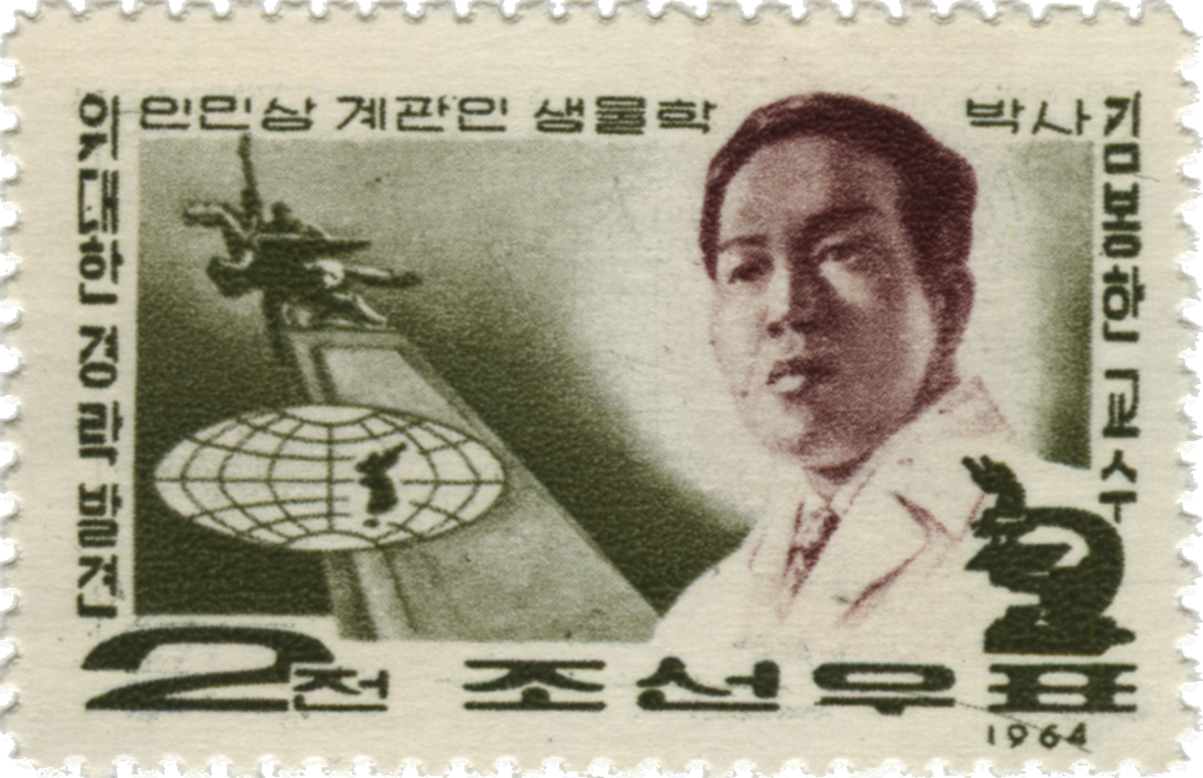 Kim Bong-Han